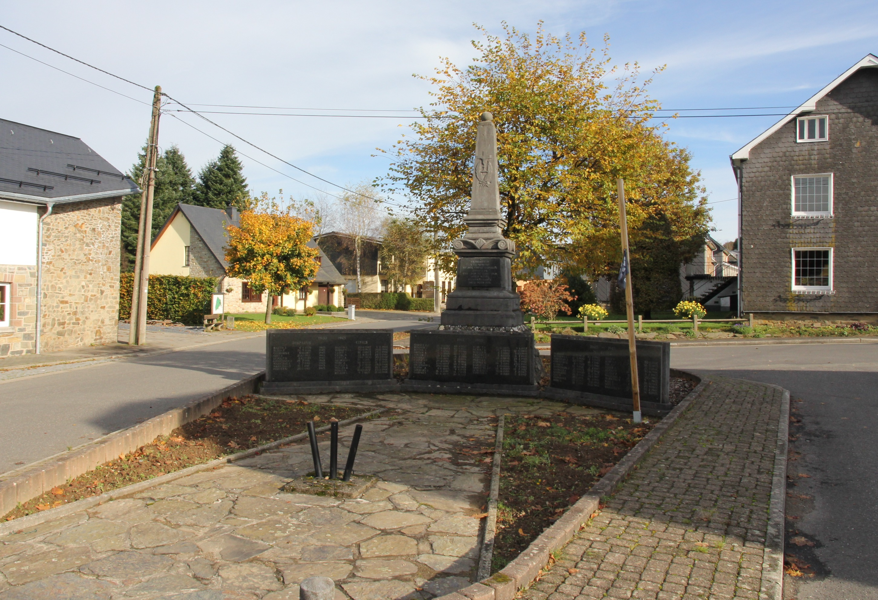 Denkmal für die Gefallenen und getöteten Bürger von Faymonville zwischen 1940 bis 1945